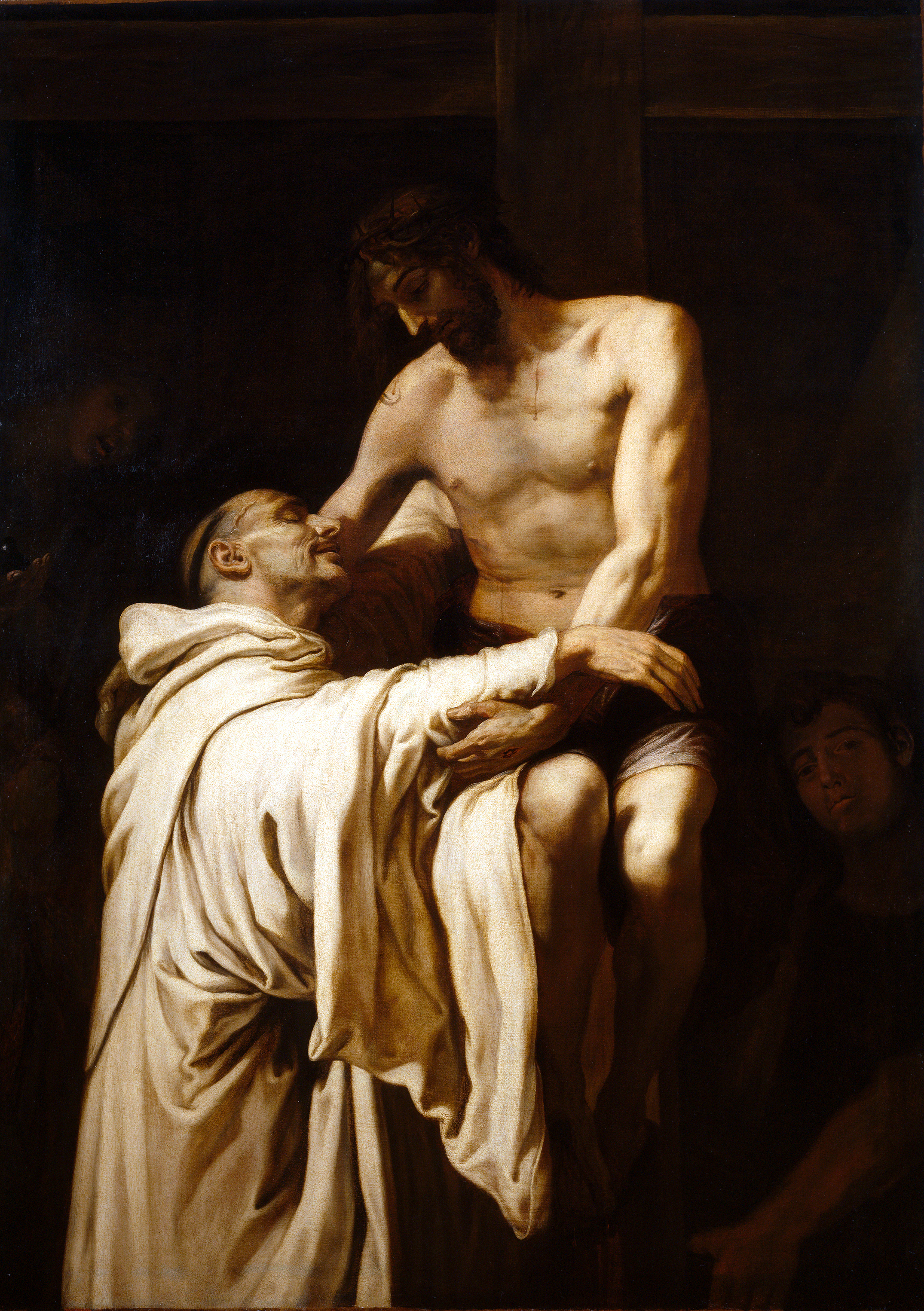 La obra representa a Jesucristo abrazando al monje cisterciense San Bernardo de Claraval.